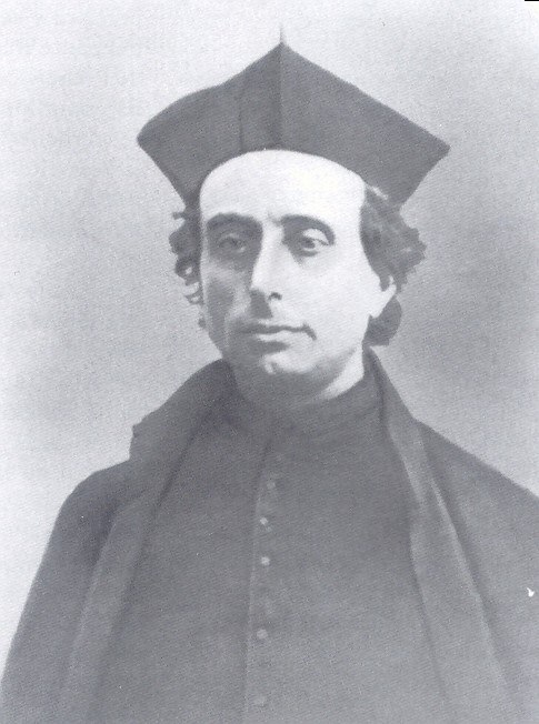 Ancienne photographie de Henri Ramière, jésuite français et apotre de la dévotion au Sacré-Coeur de Jésus